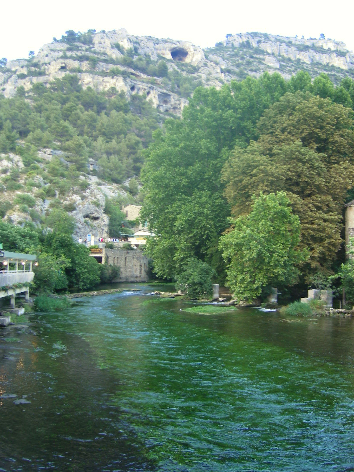 La rivière Sorgue derrière l'Exsurgence de la Fontaine de Vaucluse, France.